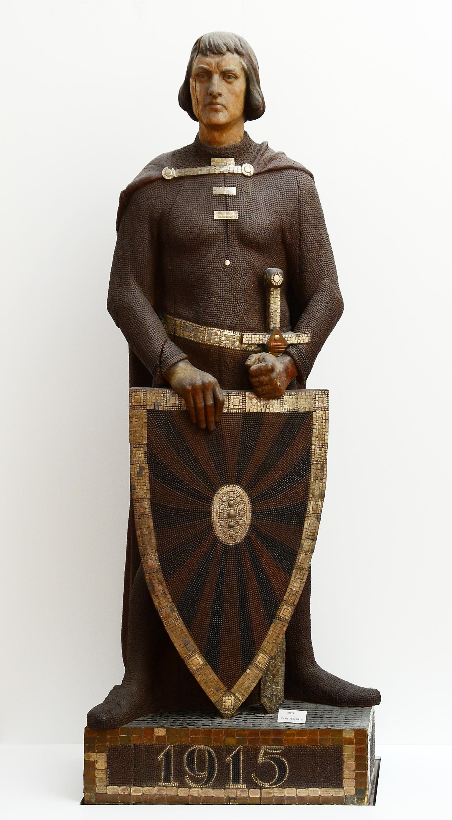 Heinrich der Löwe 1915, auch eiserner Heinrich oder Nagelheinrich genannt entstand zur Hilfe der Rüstungsindustrie im ersten Weltkrieg, Braunschweigisches Landesmuseum, Braunschweig